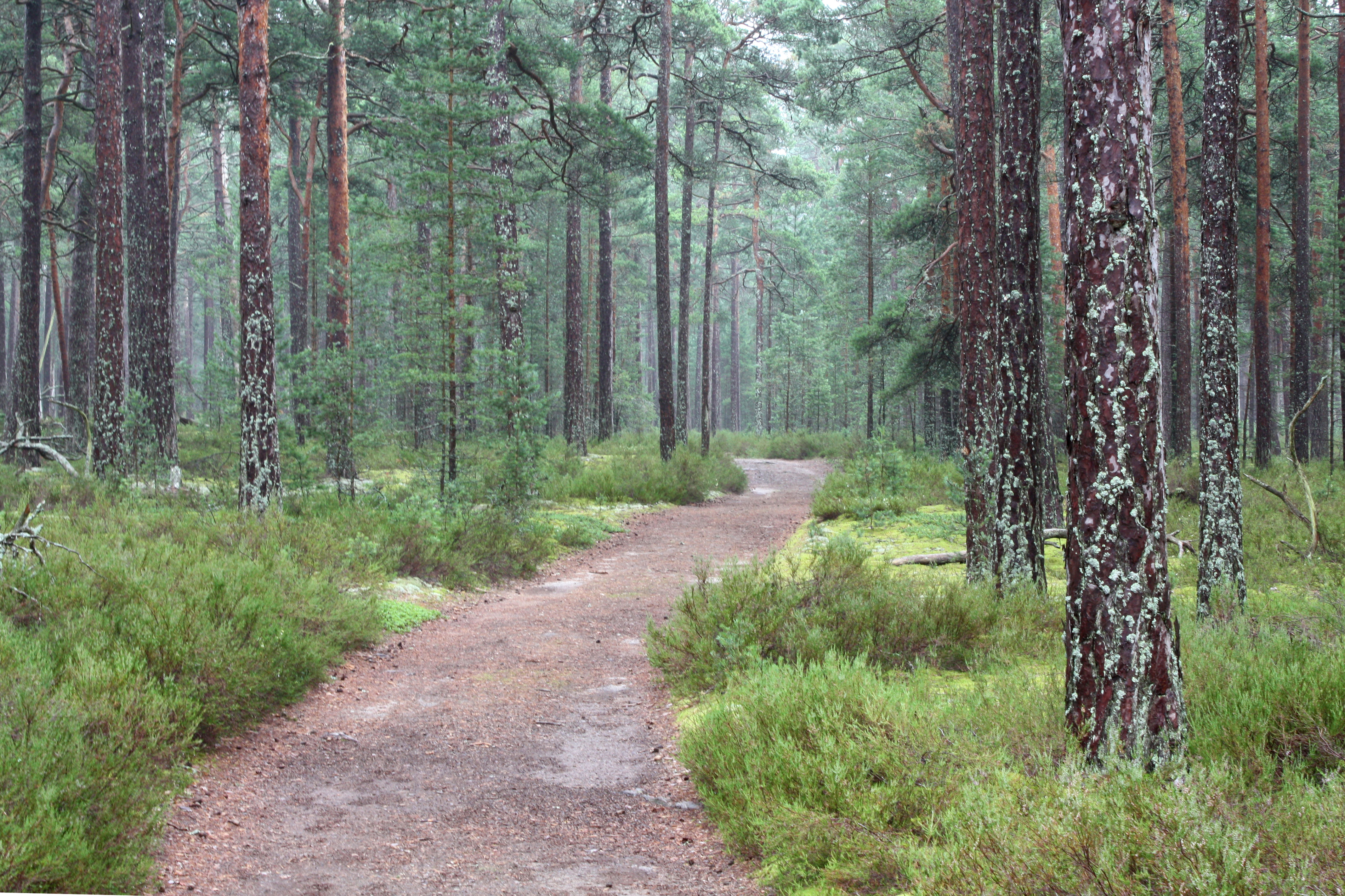 Hamnuddsvägen, Gotska Sandön, Sweden